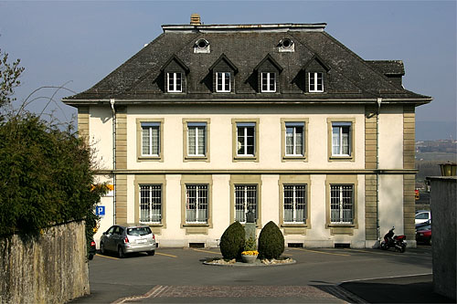 Avenches: Poste et Monument Guisan